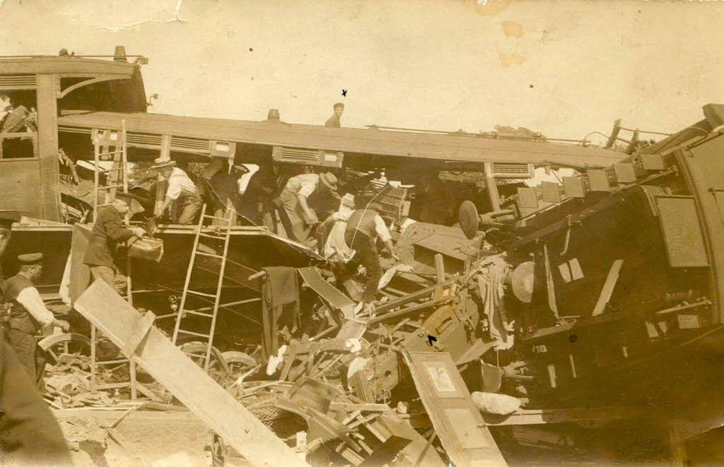 Beim Eisenbahnunfall von Müllheim am 17. Juli 1911 fuhr der D-Zug 9 von Mailand nach Berlin mit stark überhöhter Geschwindigkeit in eine Baustelle im Bahnhof Müllheim und entgleiste, weil der Lokomotivführer vorher größere Mengen Wein und Bier getrunken hatte. 14 Tote und 32 zum Teil schwer Verletzte waren die Folge. Viele Bürger halfen damals beim Bergen der Trümmer.